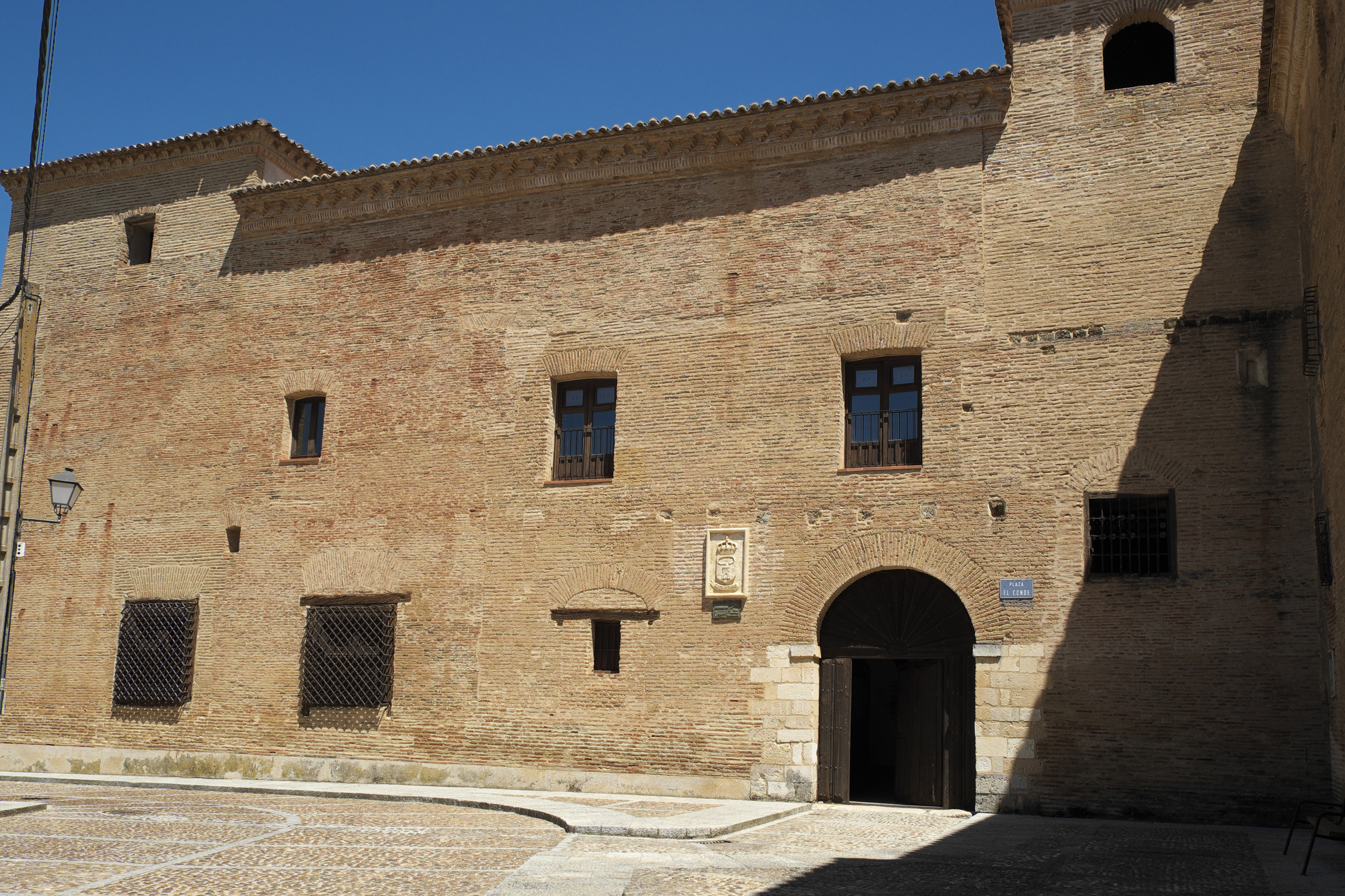 Palacio de los Condes de Grajal in Grajal de Campos in der Provinz León (Kastilien-León/Spanien), Eingangsfassade